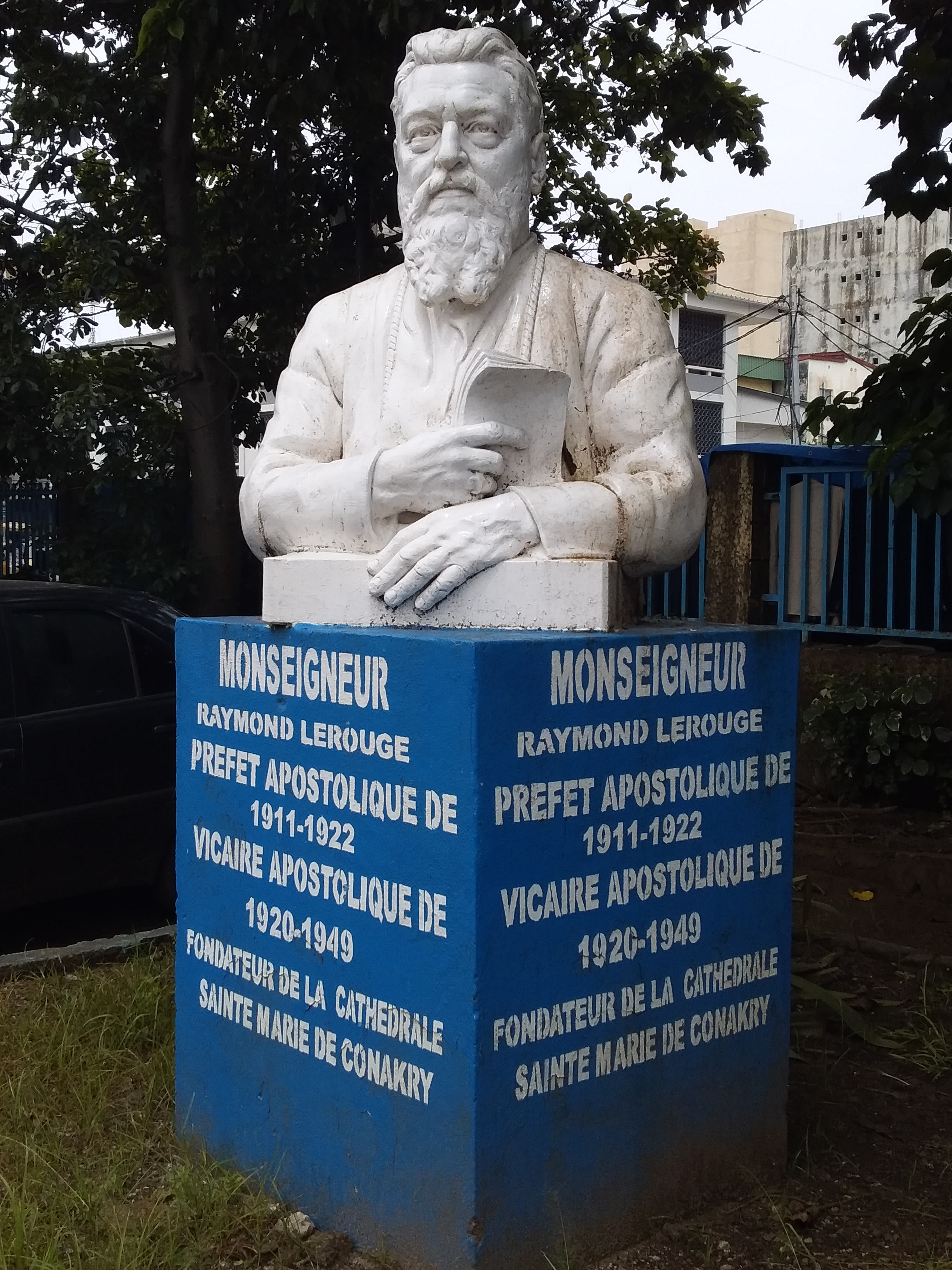 Monseigneur